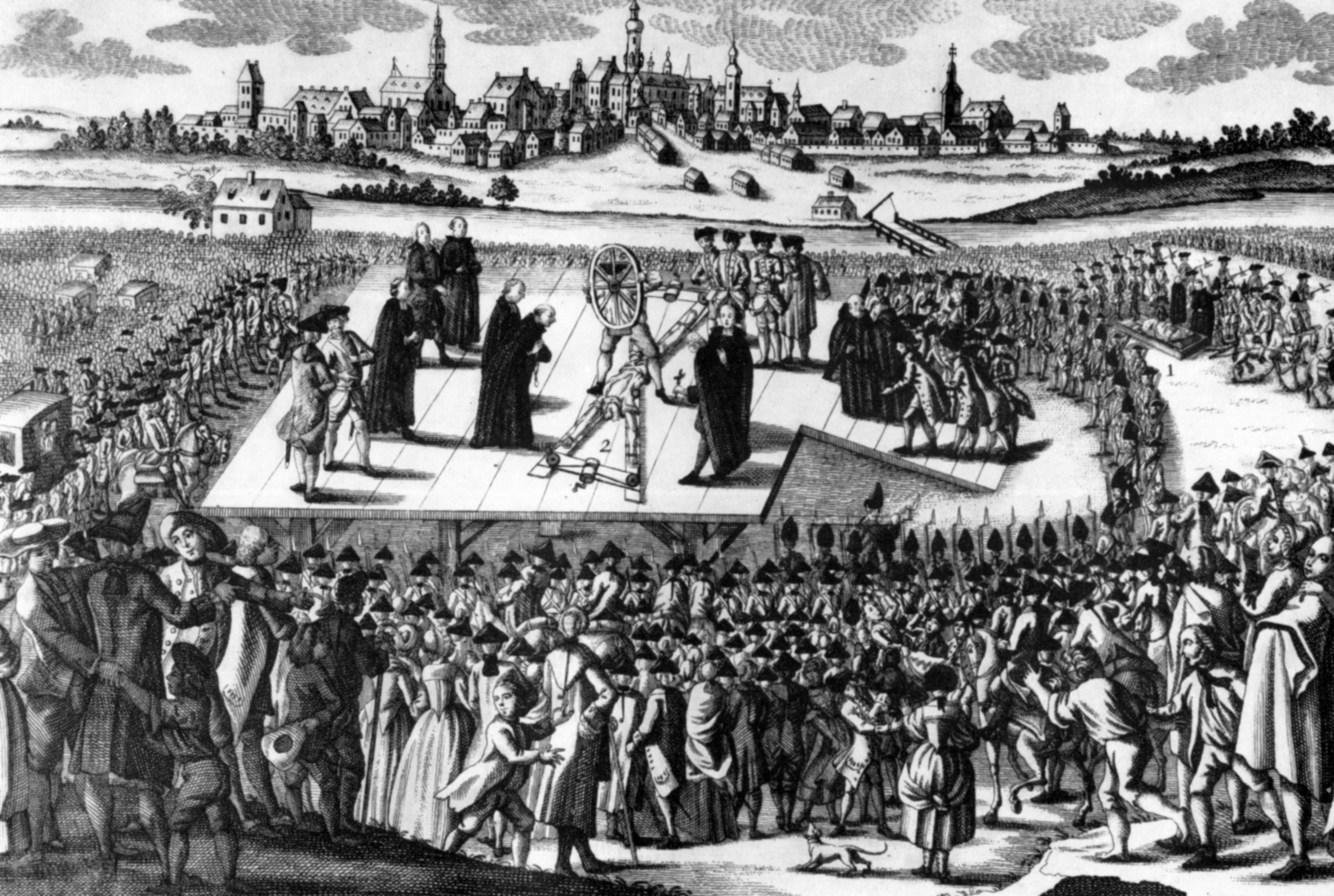 Hinrichtung des bayrischen Hiesel, Matthias Klostermayr, in Dillingen, 1771, Kupferstich von J. G. Will, Augsburg